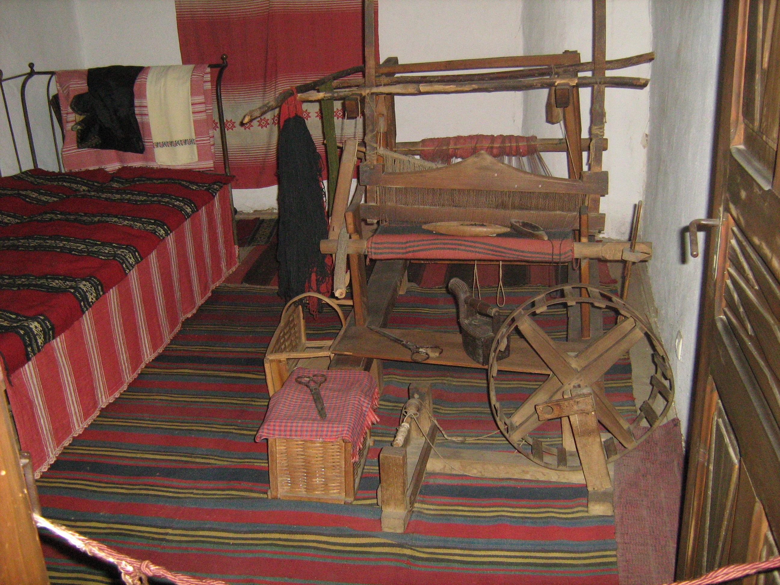 Кућа Боре Станковића, Врање